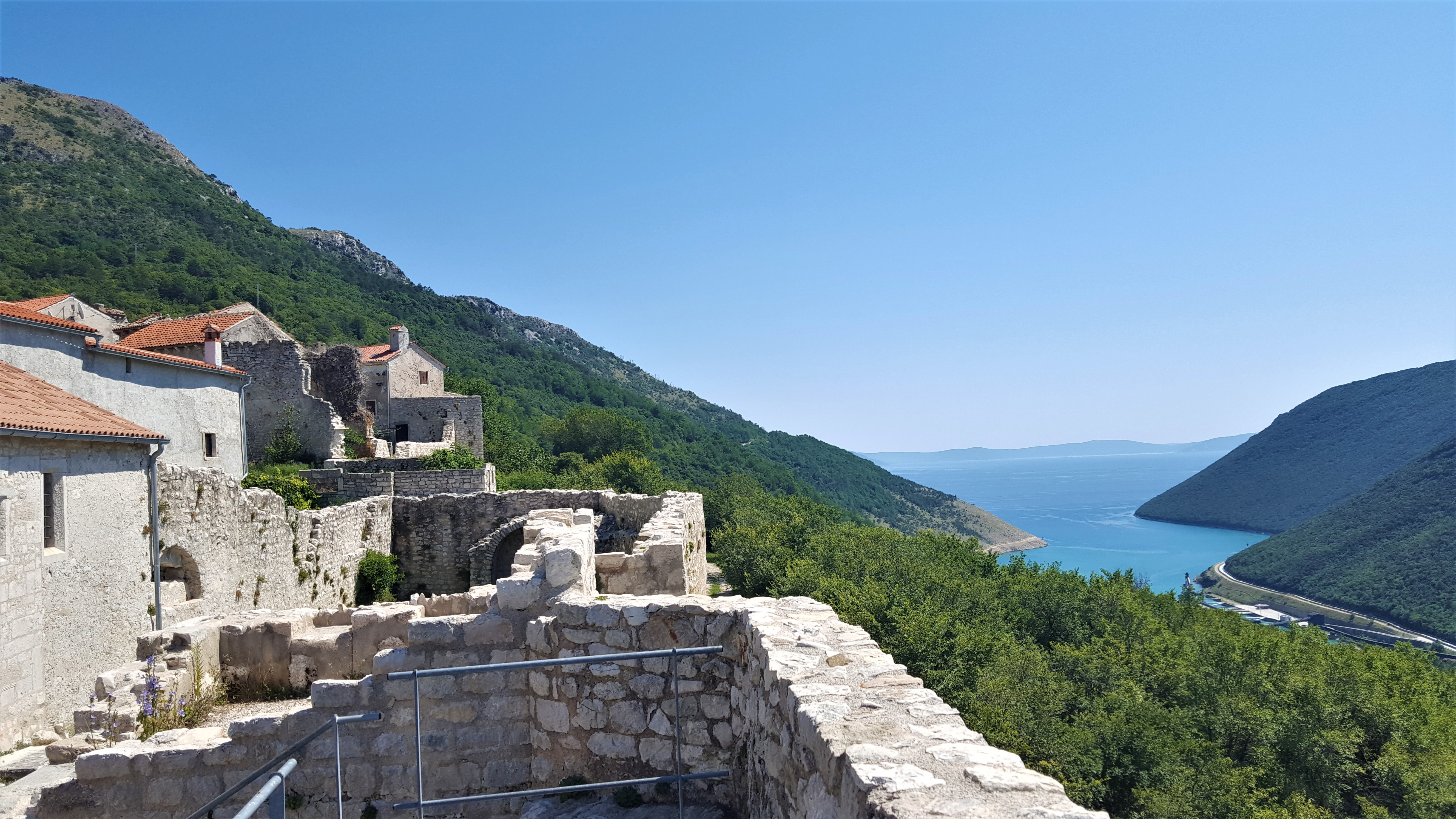 Plomin, Altstadt, Kroatien